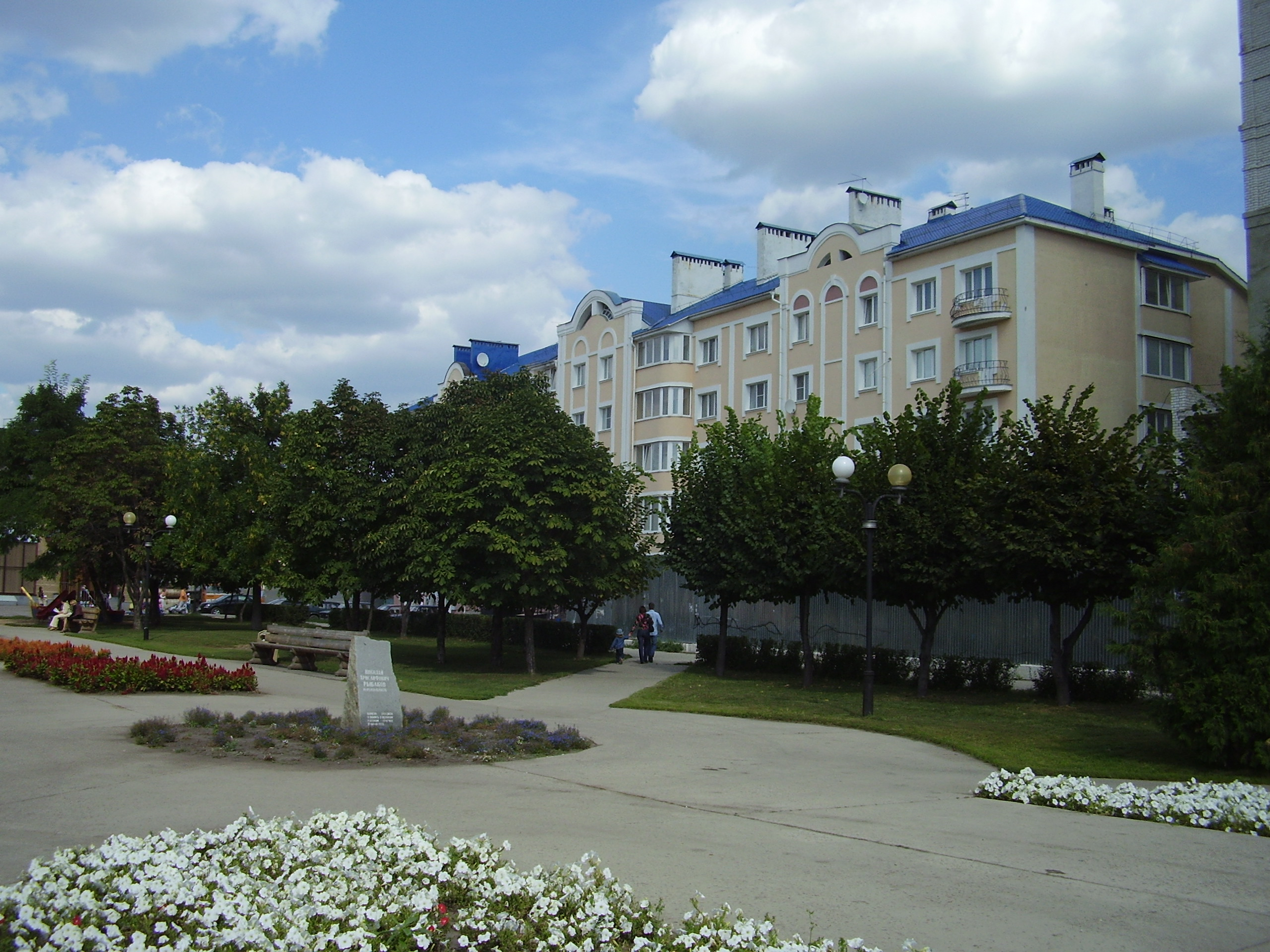 Тамбов, дом у "Детского Мира"